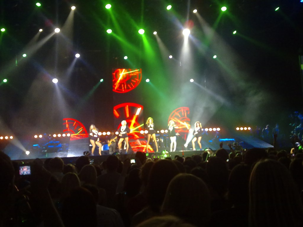 Girls Aloud Live